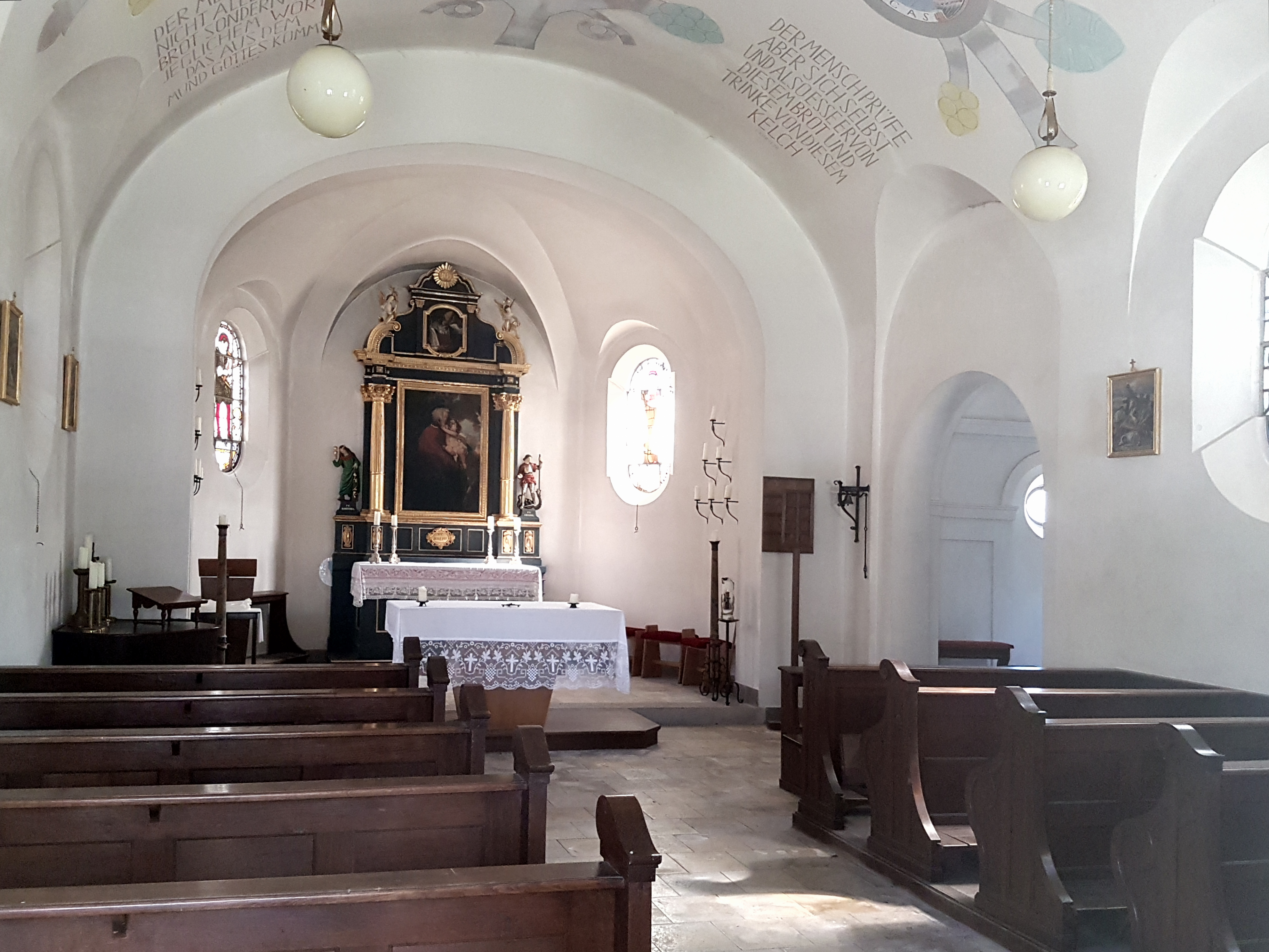 Gräfelfing, Bäckerkapelle, Innenraum mit Blick zum Chor (Blick durchs Fenster).